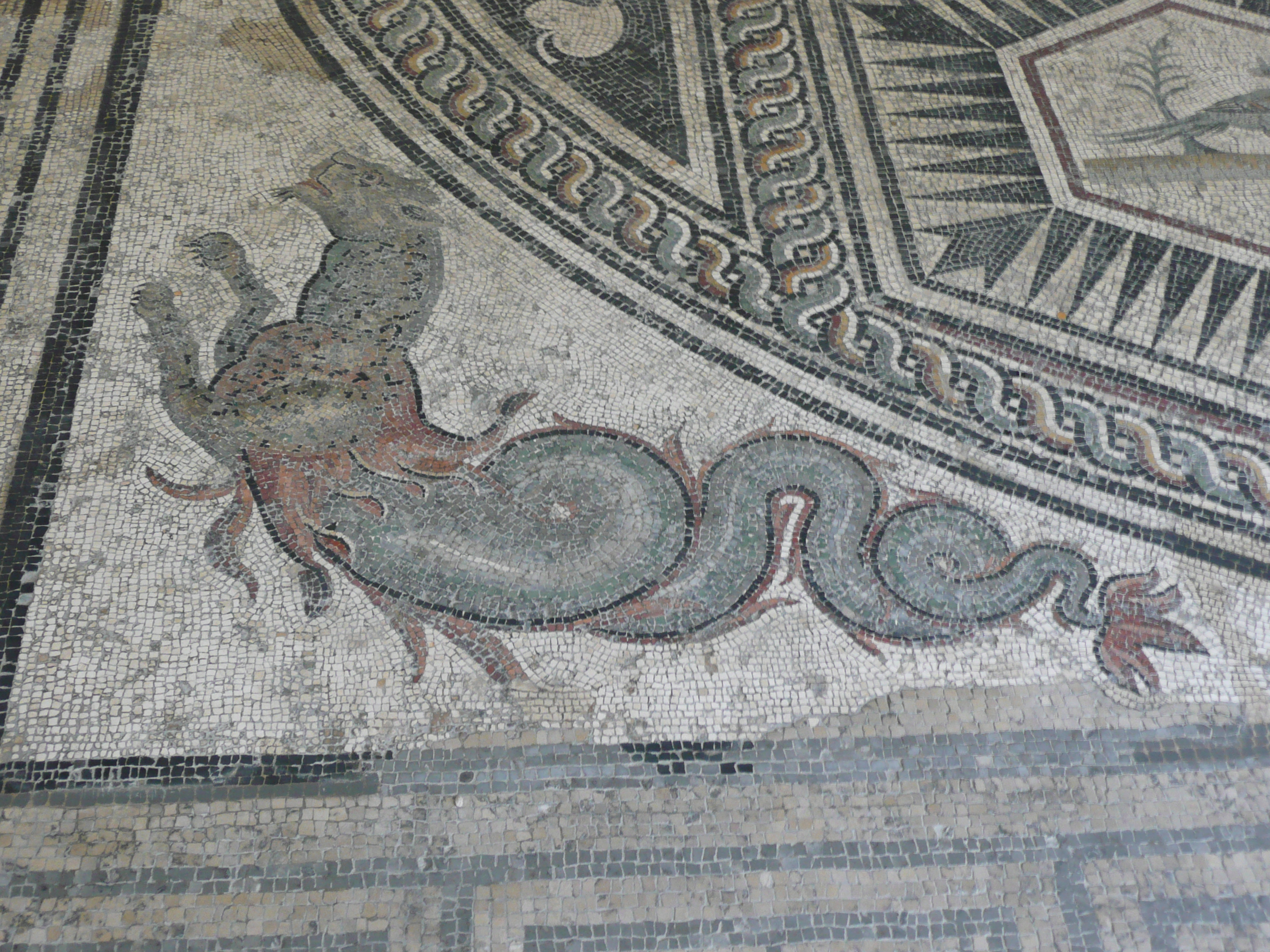 Basilisk in Vaison